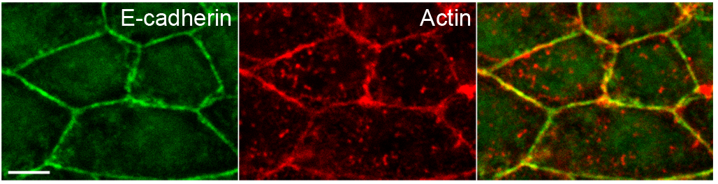 Fig 1. Células epiteliales IAR. (C) Células IAR-2 teñidas para E-cadherin (en verde) y actina (rojo). A la distancia de 1.25 μm por encima del substrato muestran las Adherens Junctions organizadas como cinturones de adhesión rodeando cada célula y co-localizadas con haces de actina circunferencial en el extremo apical de los enterocitos. Scale bar 10 μm.